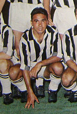 Roma, stadio Olimpico, 29 agosto 1965. Il calciatore brasiliano della Juventus, Sidney Colônia Cunha "Chinesinho", in posa dopo il successo sull'Inter (1-0) nella finale di Coppa Italia 1964-65.